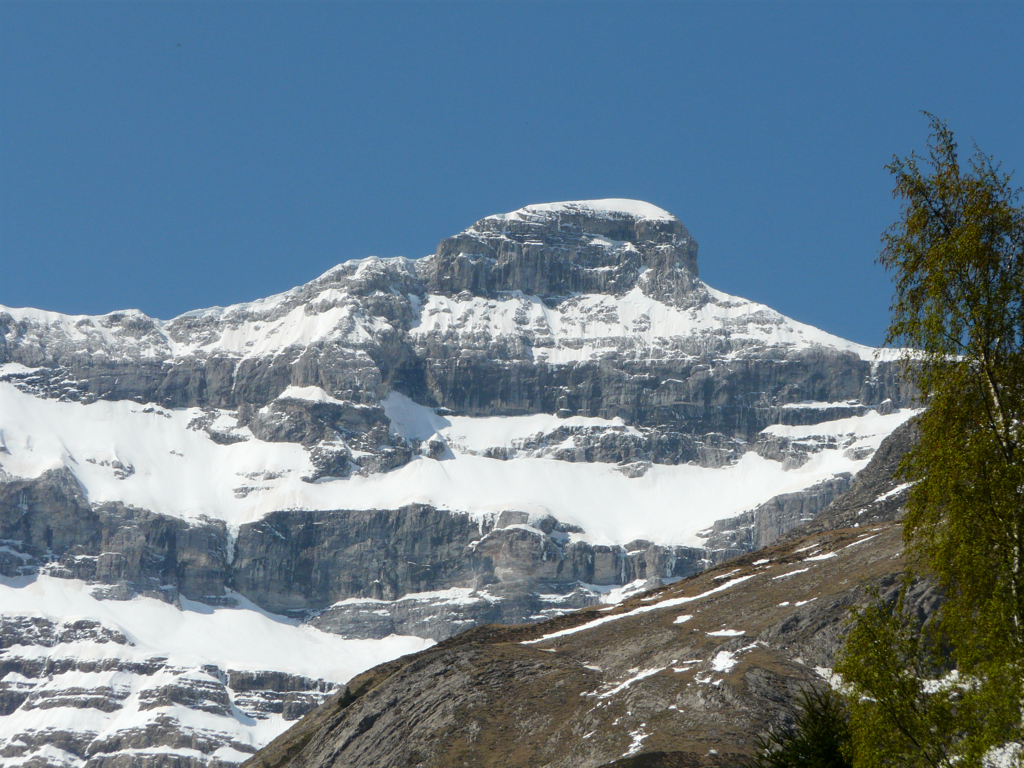 Le Casque (3006 m), Cirque de Gavarnie, Hautes-Pyrénées, France.